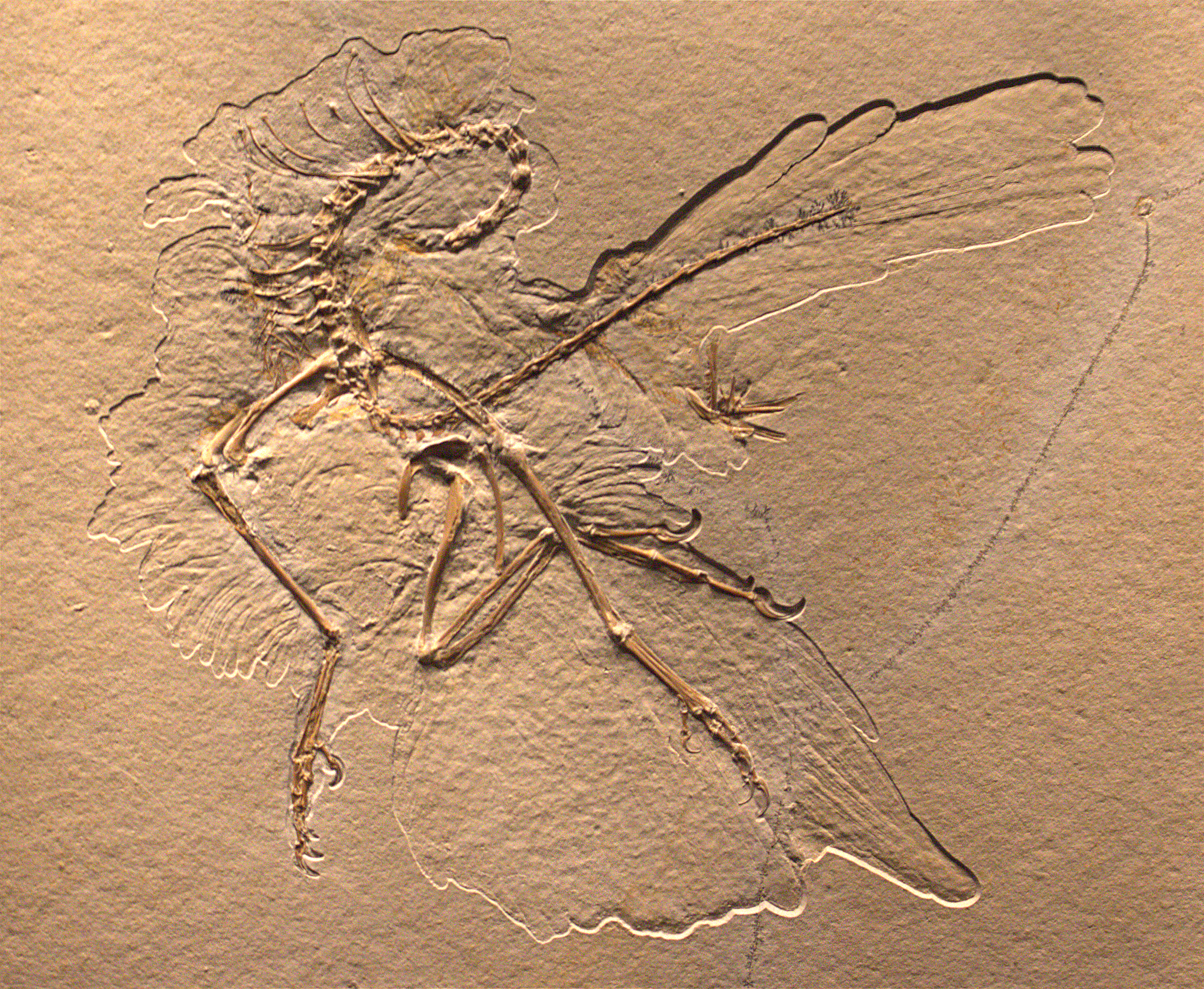 Fotographie der Originalplatte von Archaeopteryx Nummer 11, ausgestellt im Senckenberg-Museum in Frankfurt.